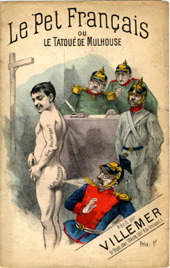 Le Pet français, ou la Tatoué de Mulhouse, récit de Maxime Villemer [Anne Violet], illustré par Charles Clérice.